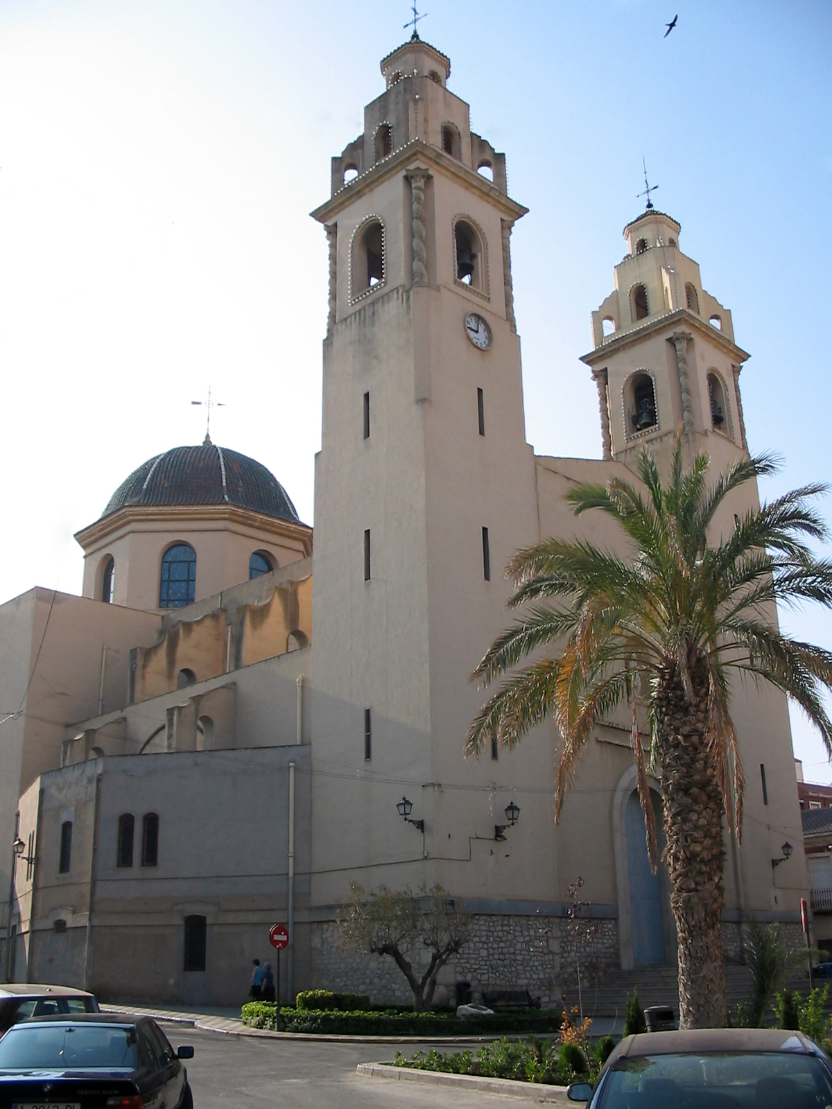 Fotografía de la Iglesia de Santa Ana de Elda, Alicante, España.